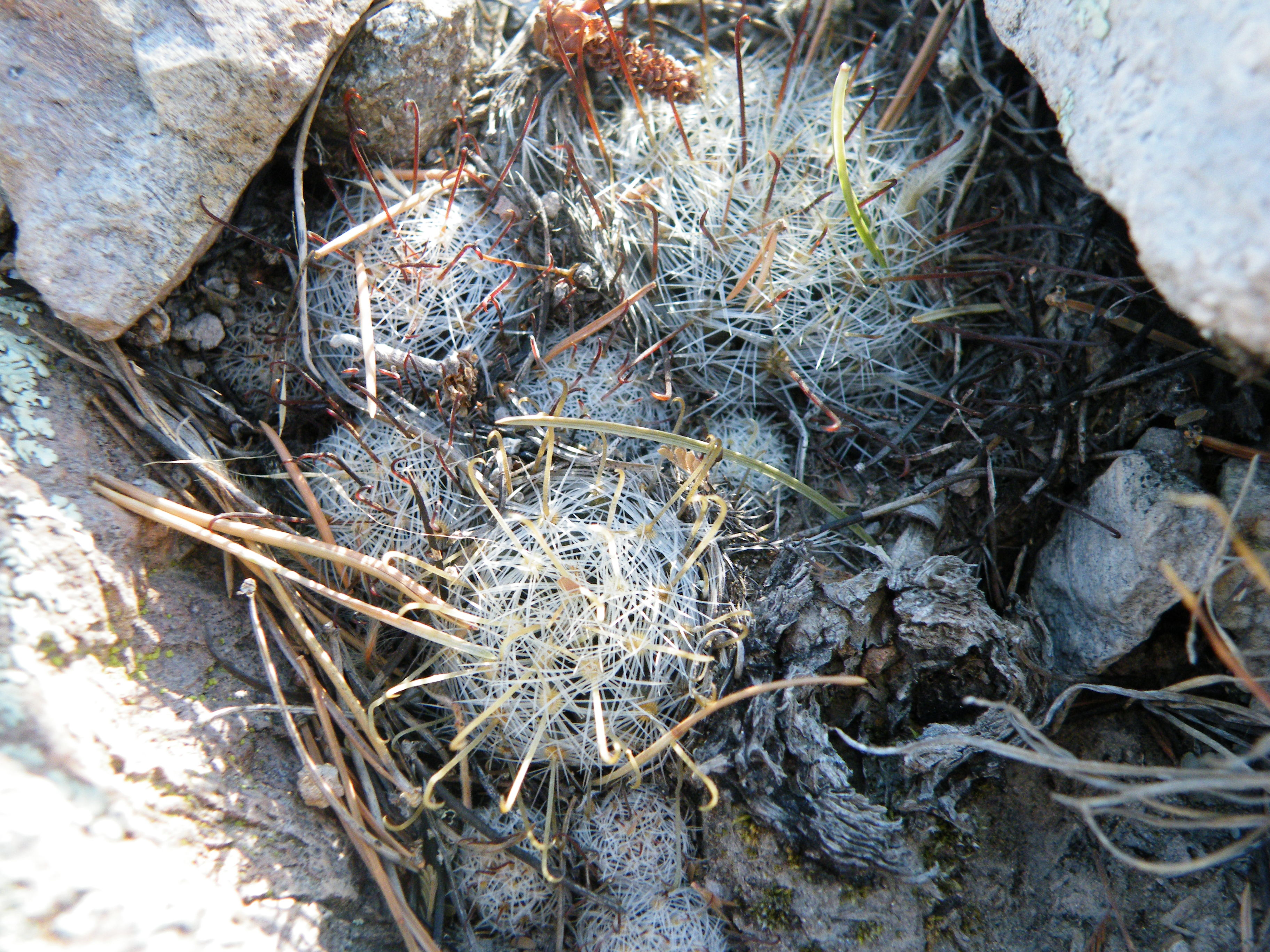 Coneto Pass, Durango